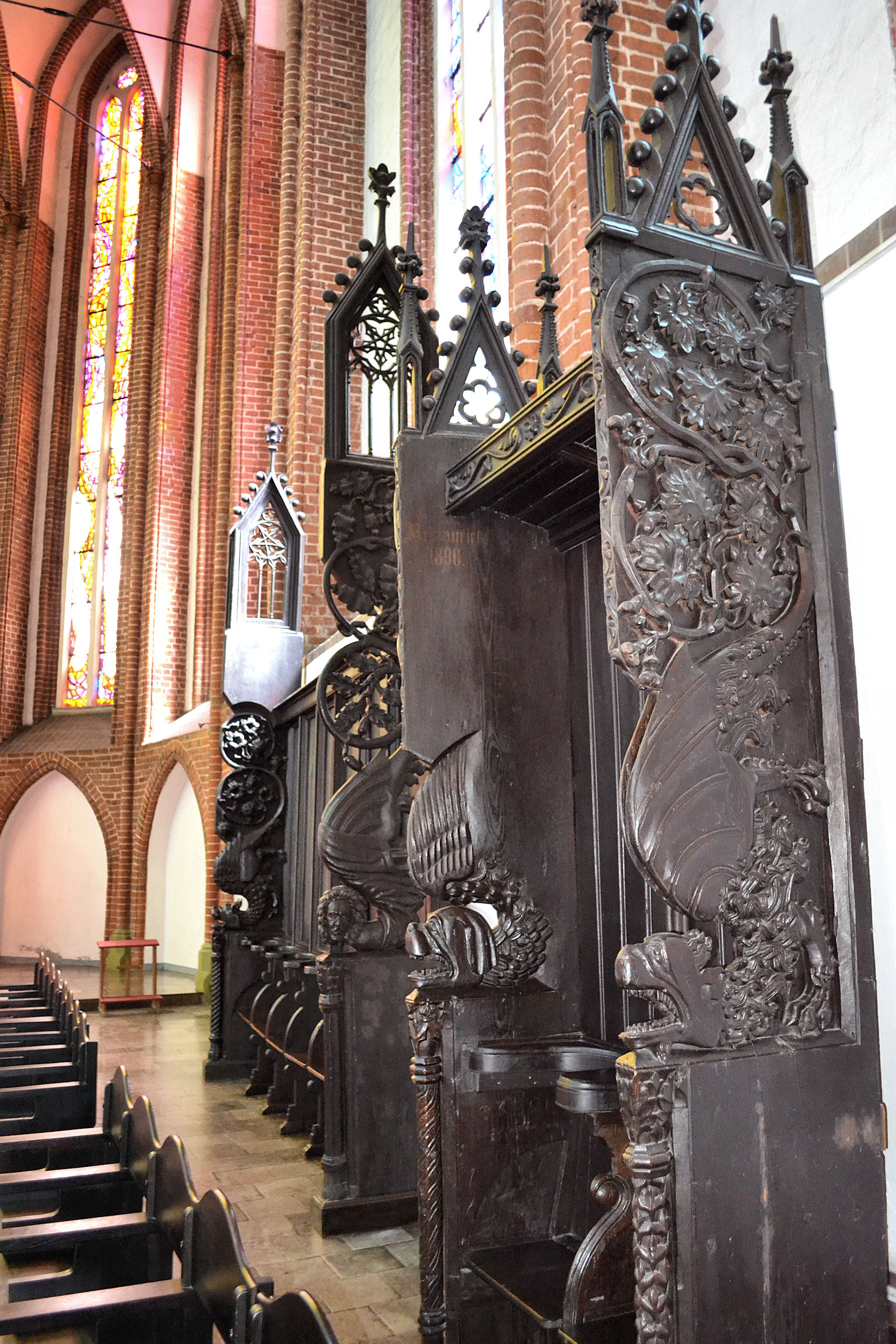 Stalle kapituły w katedrze kołobrzeskiej